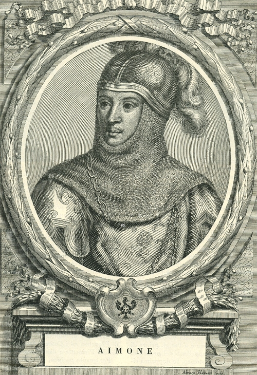 Ajmono (1291-1343), 16-grafo de Savojo.